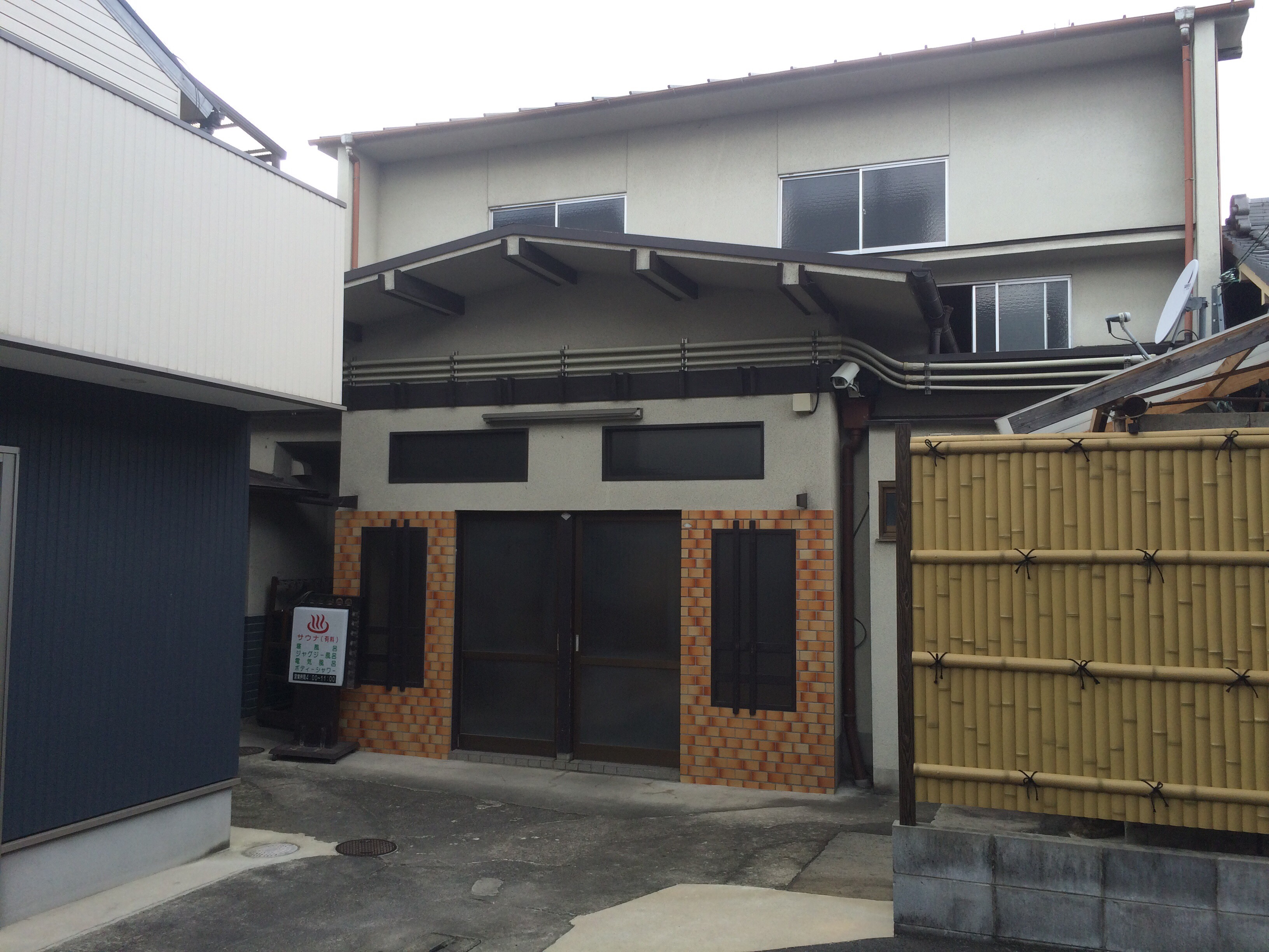 軍人湯、京都、藤森